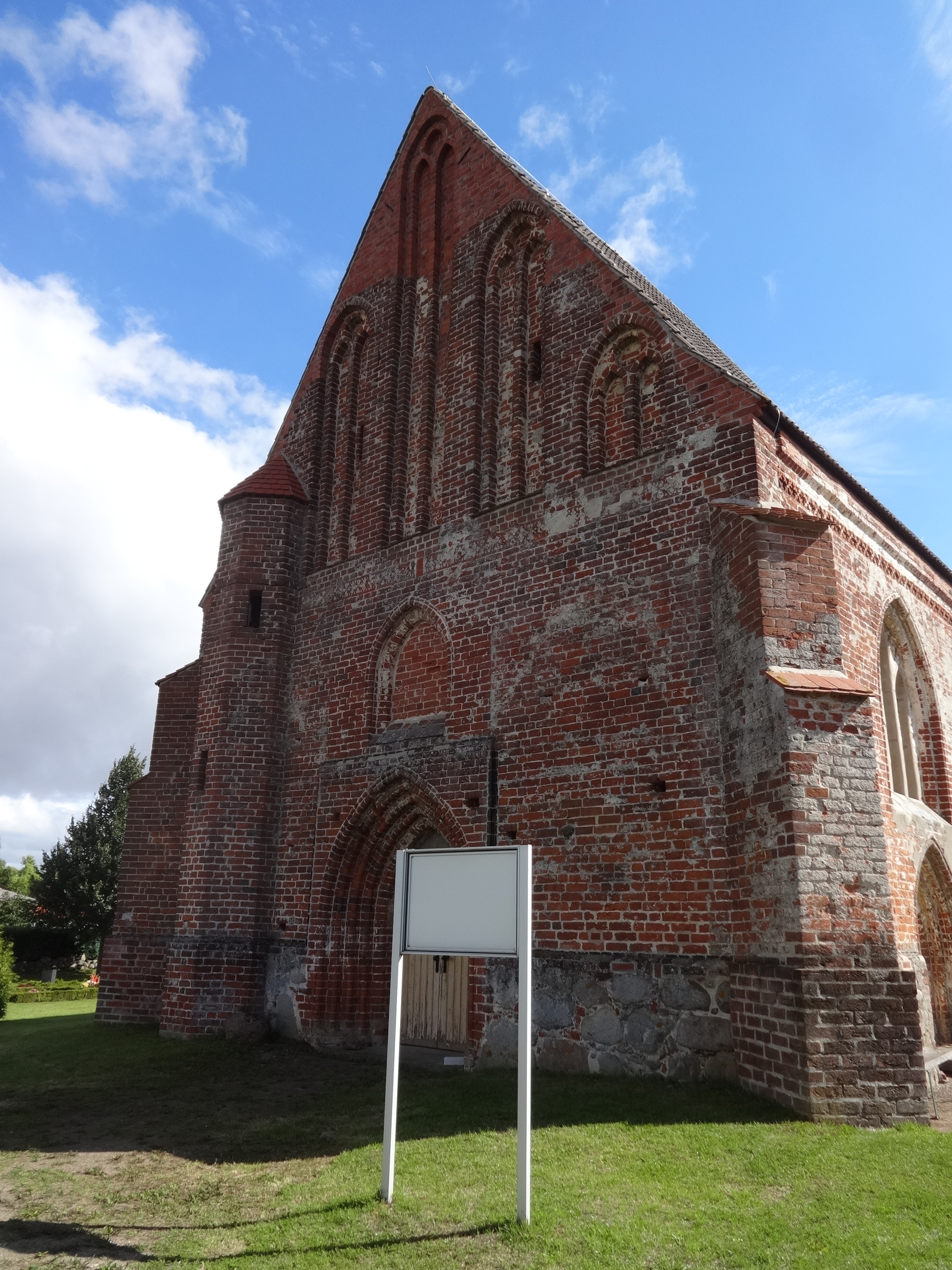 Die Dorfkirche Sassen entstand im 13. Jahrhundert aus Feldsteinen und wurde vermutlich im 15. Jahrhundert um ein Kirchenschiff aus Mauerstein erweitert. In Innern befindet sich eine Fünte aus der Zeit um 1300. Eine Glasmalerei aus dem 19. Jahrhundert zeigt den Guten Hirten zwischen Petrus und Paulus von Tarsus und stammt vermutlich aus der Glasmalereianstalt Ferdinand Müller in Quedlinburg.